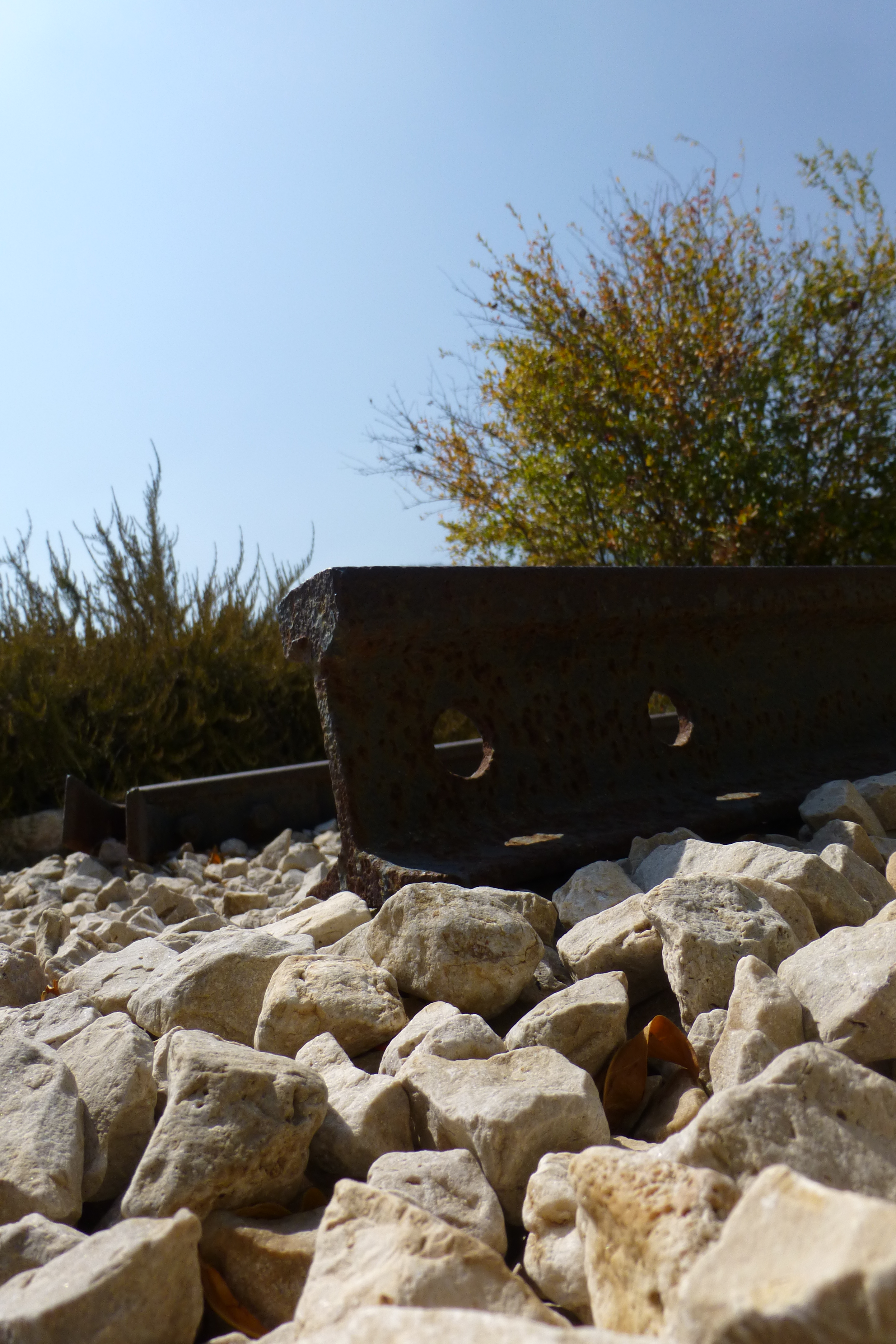 רכבת העמק - מעבירי מים והסוללה - צומת העמקים